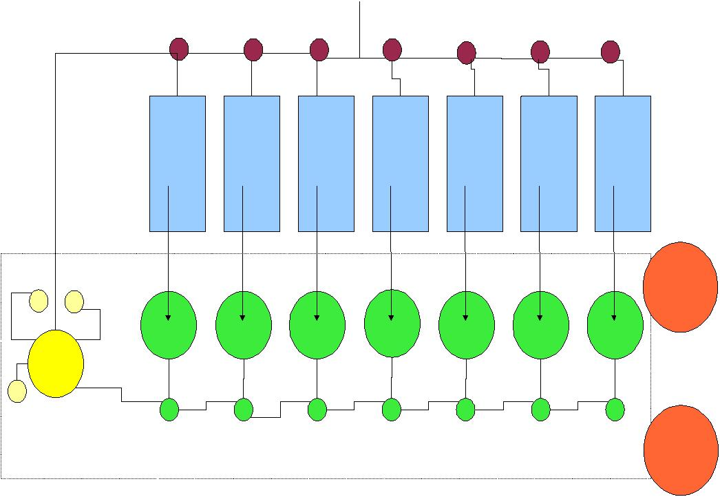 schéma d'une structure de projet sorti Benoit Minaudier